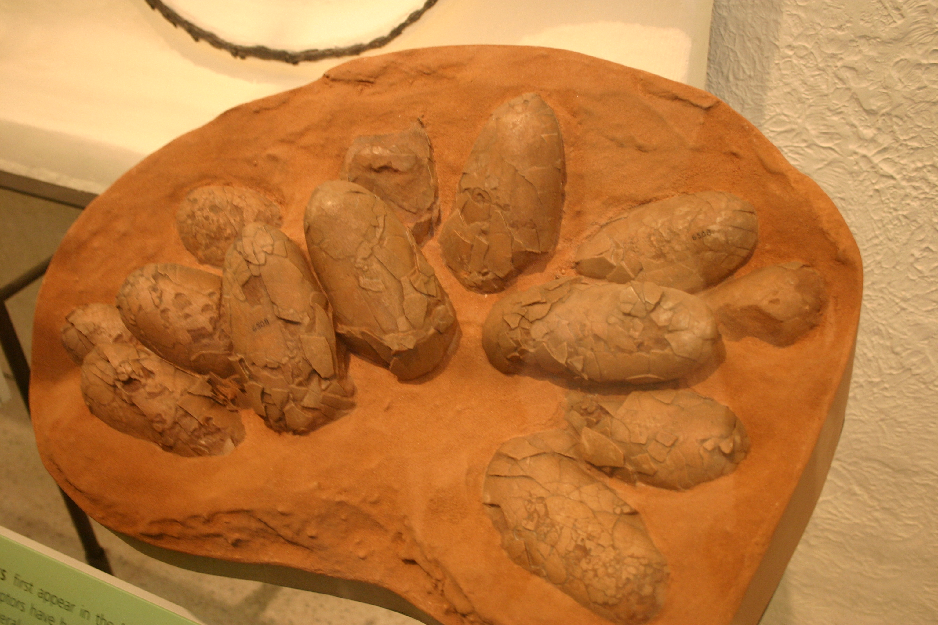 DIno Eggs